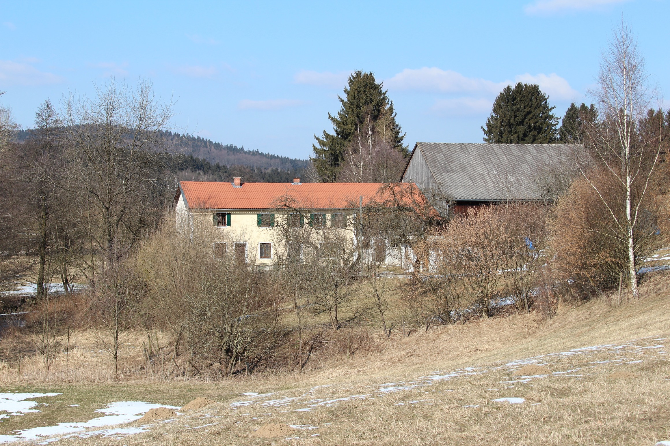 Aschamühle (Markt Winklarn)